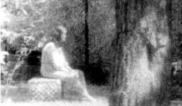 la Llorona sentada en una piedra en un bosque